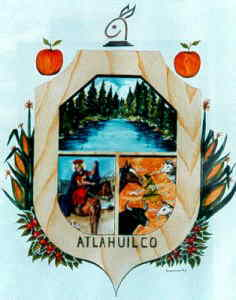 escudo de armas de Atlahuilco